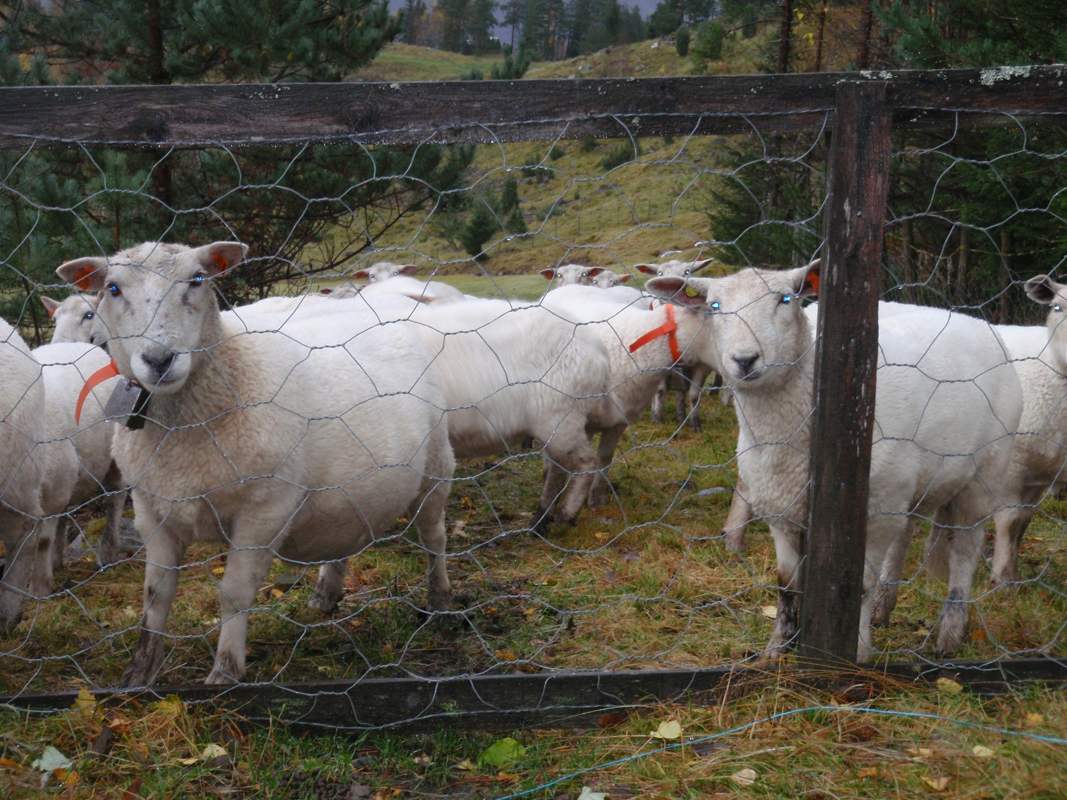 Norsk kvit sau. Photographer: Guttorm Flatabø